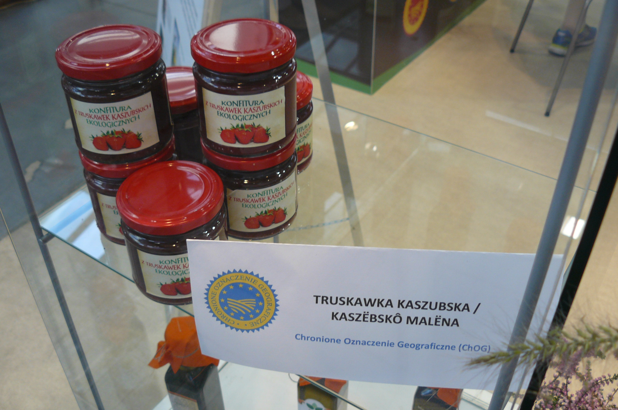 Smaki Regionów - Poznań. 2015r.